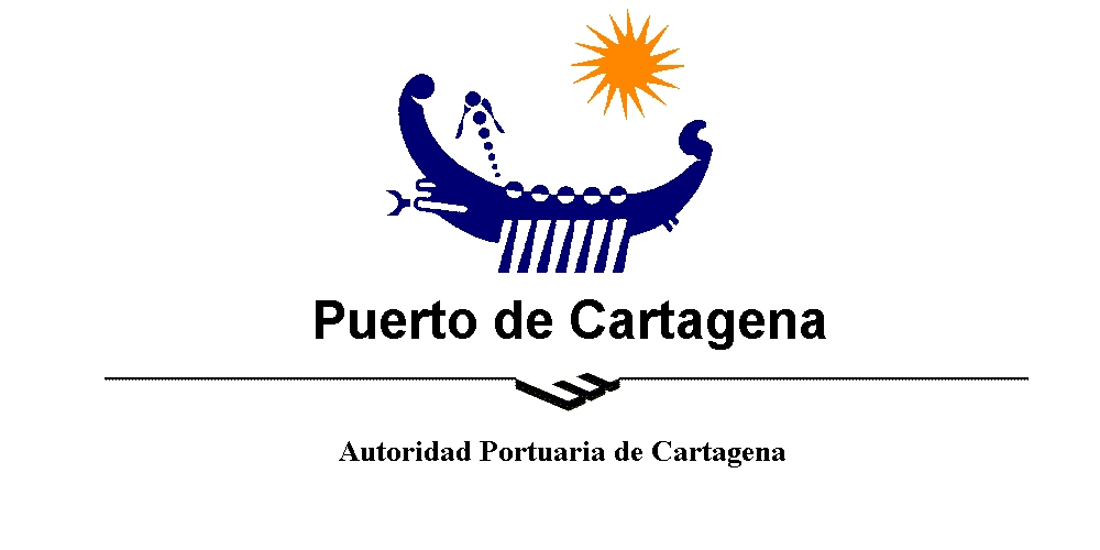 Barco con sol